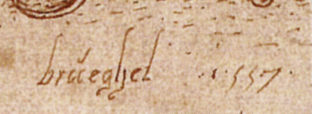 Signatur und Datierung auf dem Kupferstich Die sieben Laster, Ira von Pieter Bruegel dem Älteren.(Gabinetto dei Disegni e delle Stampe, Florenz)